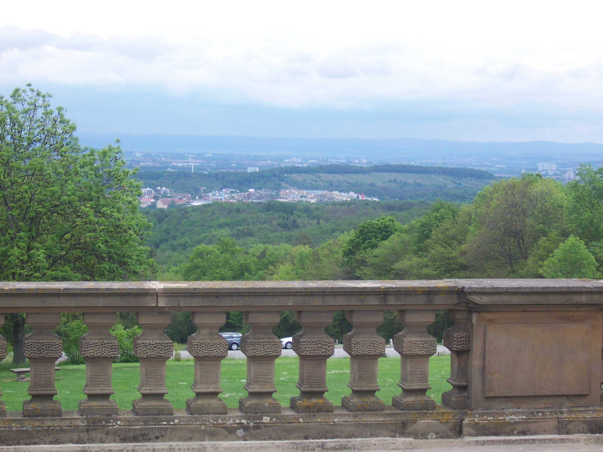 von mir fotografiertes Bild